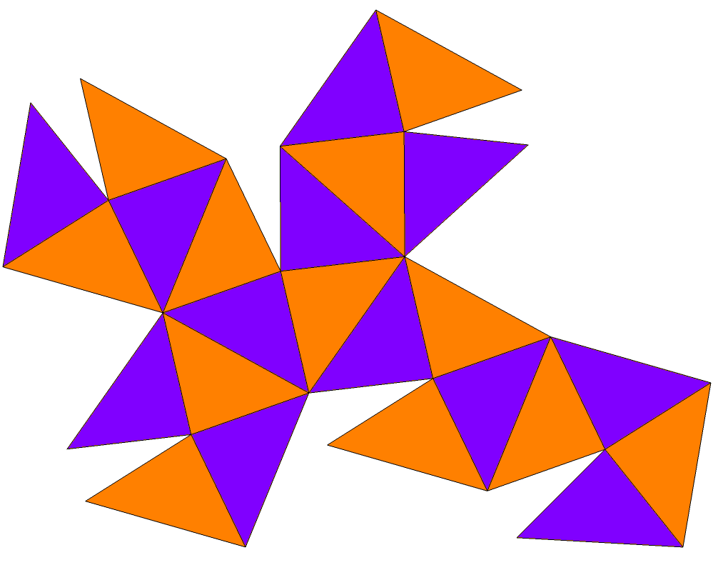 Tetrakishexahedron net